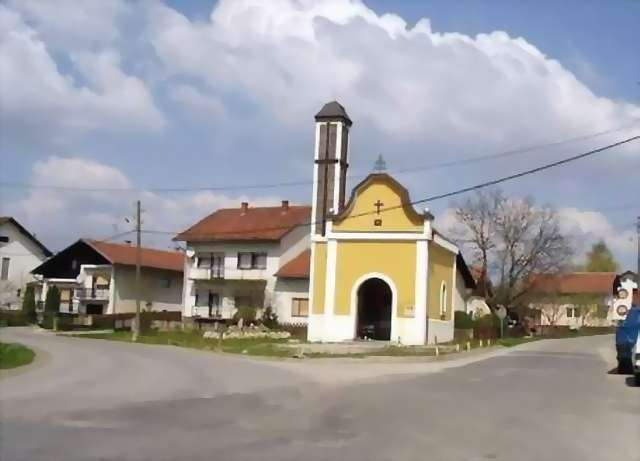 centar sela Celine pokraj Vrbovca